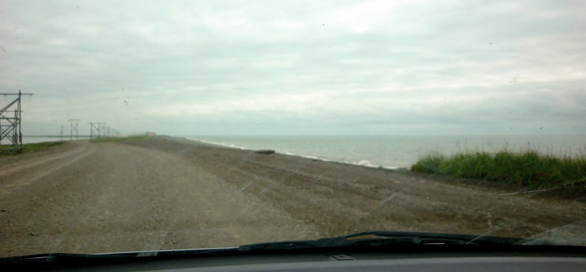 "Jedenasty kilometr" na mierzei oddzielającej Morze Ochockie od rzeki Bolszaja, koło osiedla Oktiabr'skij52°41′57″N 156°13′15″E / 52.699222°N 156.220865°E